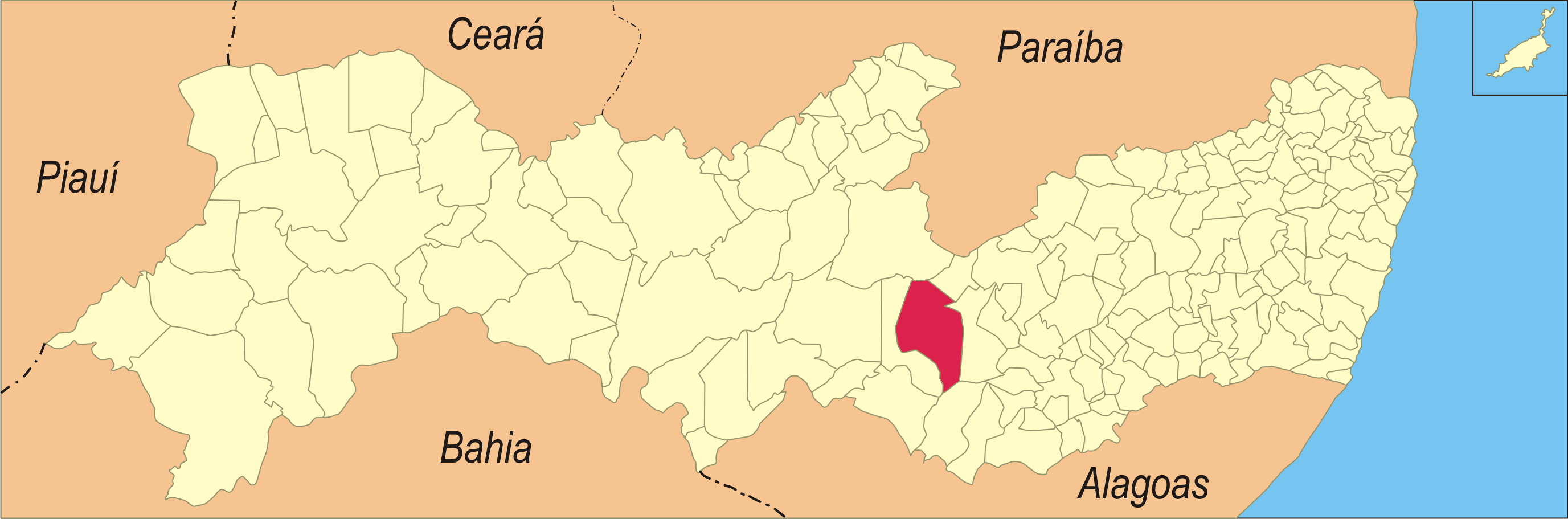 Localização da cidade no estado de Pernambuco